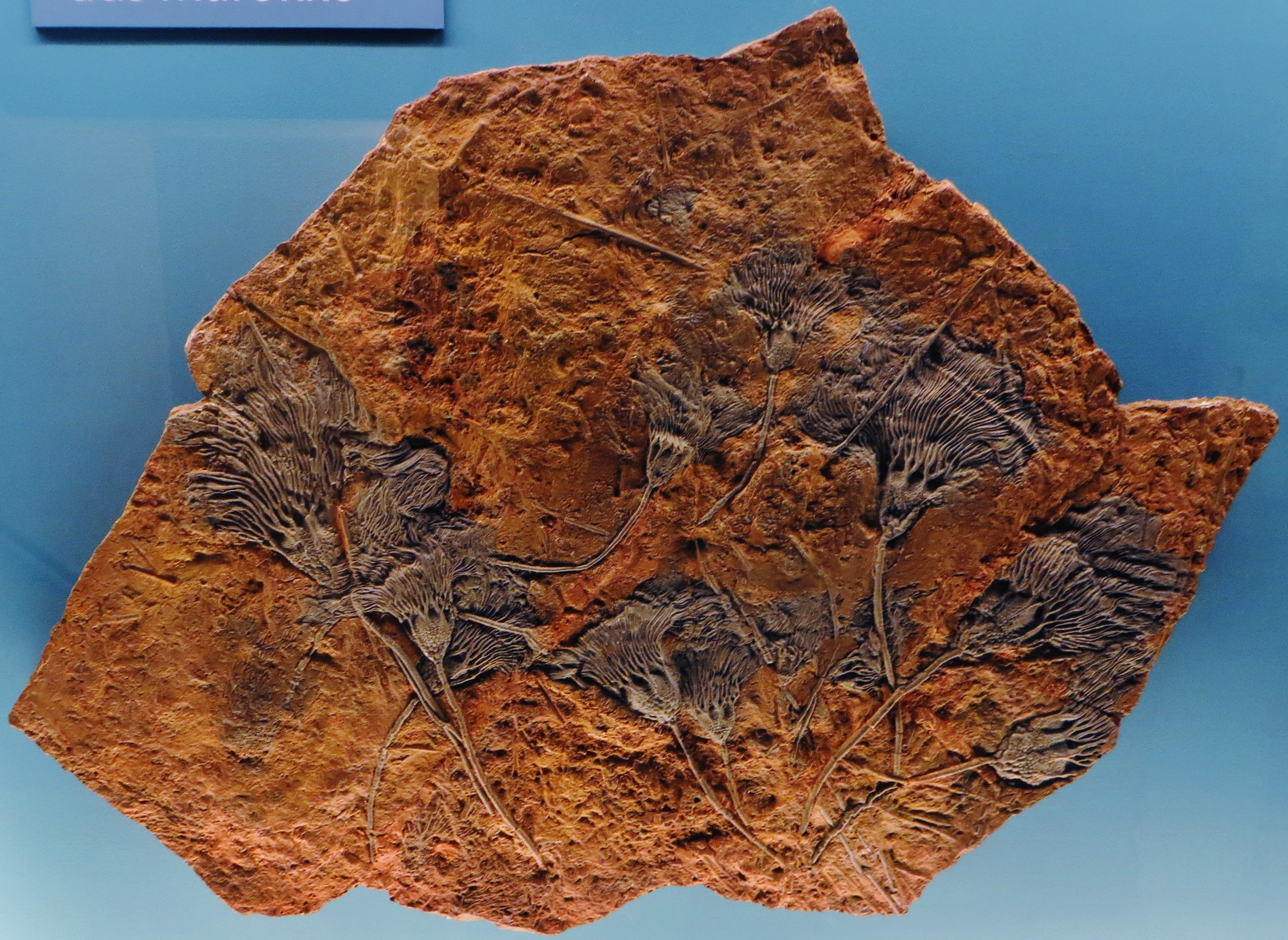 Fossil of crinoid- Took the picture at Natural History Museum, Basel